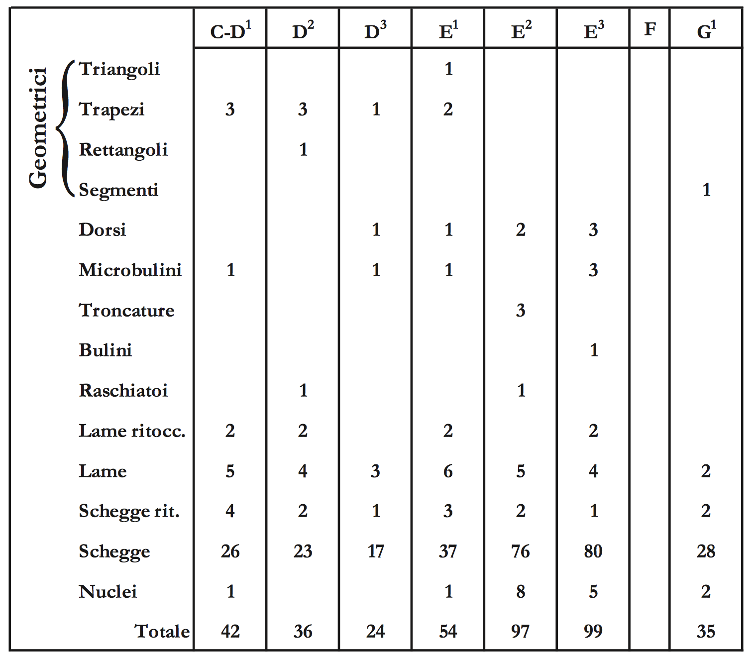 Tabella riassuntiva dei valori assoluti degli oggetti litici, del prof. Bordati von Lowenstern